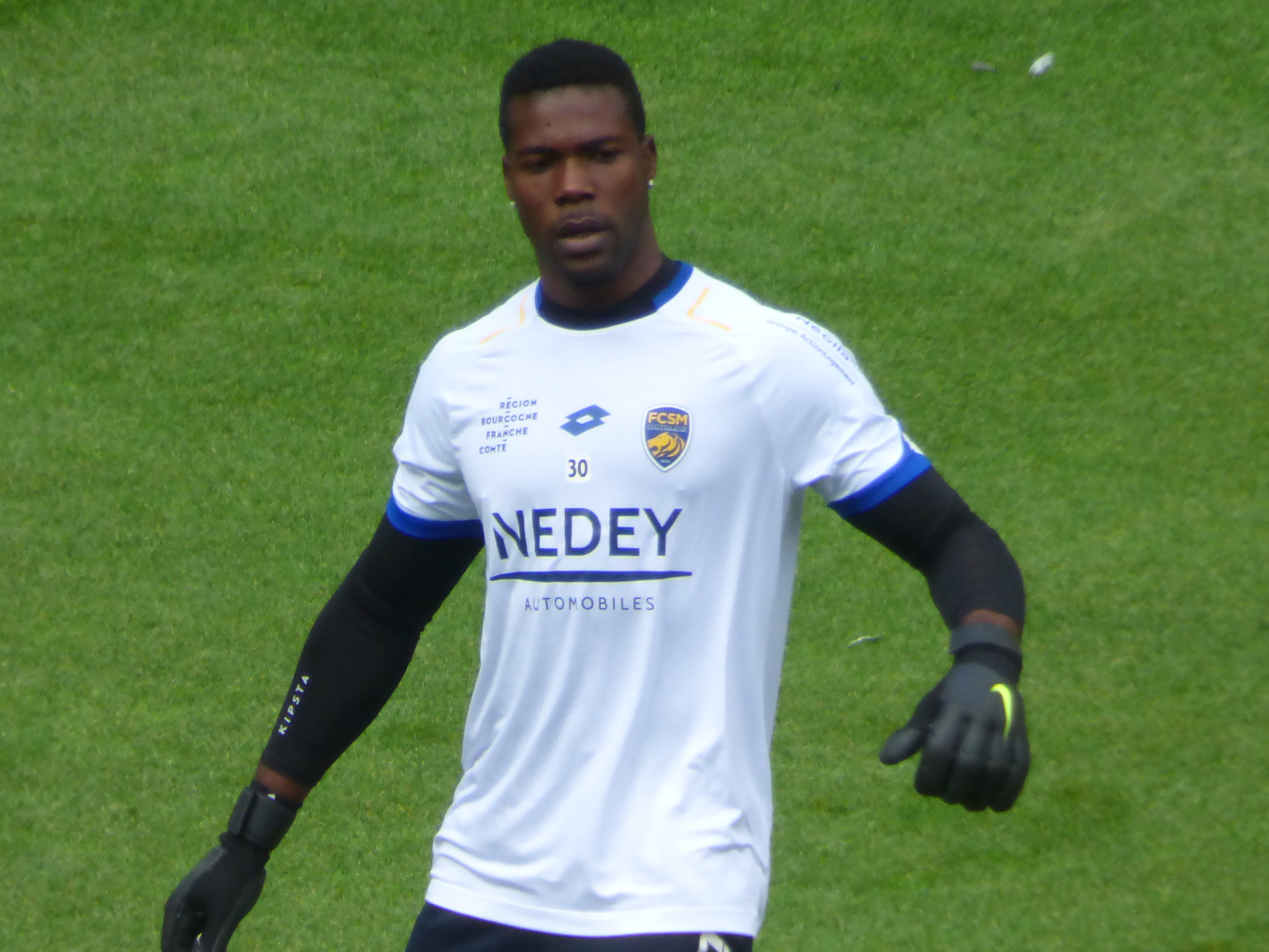 Lawrence Ati-Zigi avant le match Lens / Sochaux, comptant pour la septième journée du championnat de France de football de Ligue 2, le 15 septembre 2018.